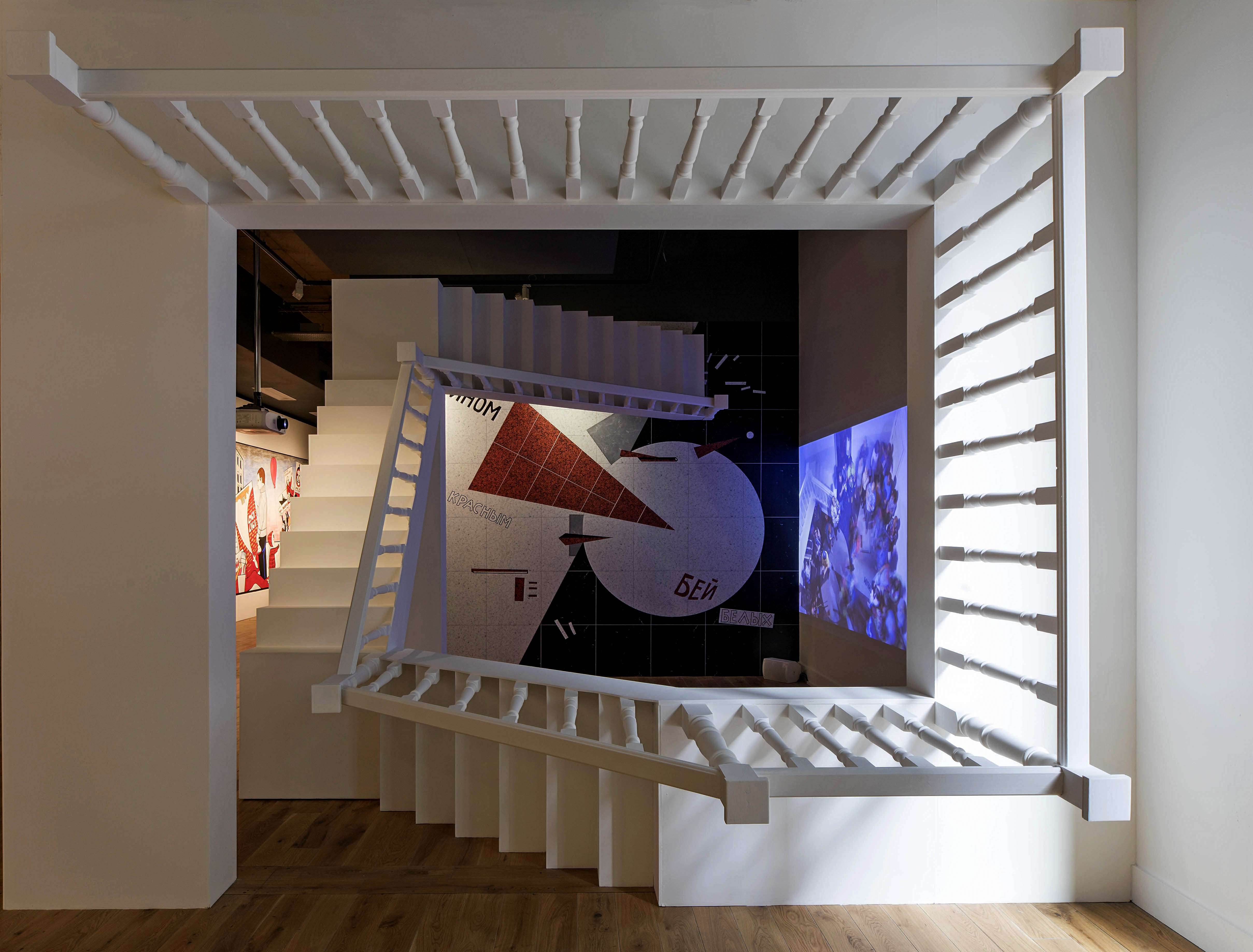 Руслан Вашкевич. Victory Over The Sun. Return of Memory